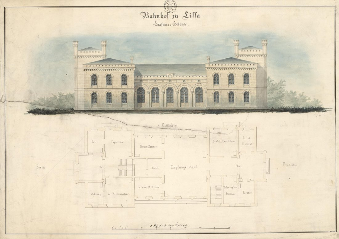 Budynek dworca kolejowego w Lesznie uruchomionego w 1856 r. wzniesiony został w stylu posiadającym cechy neogotyckie i arkadowe (niem. Rundbogenstil). (projekt w Archiwum Państwowym w Lesznie)